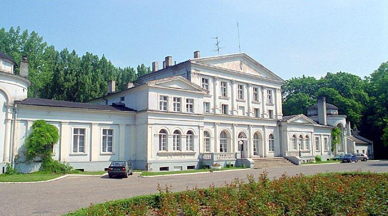 Warszawa (Polska)